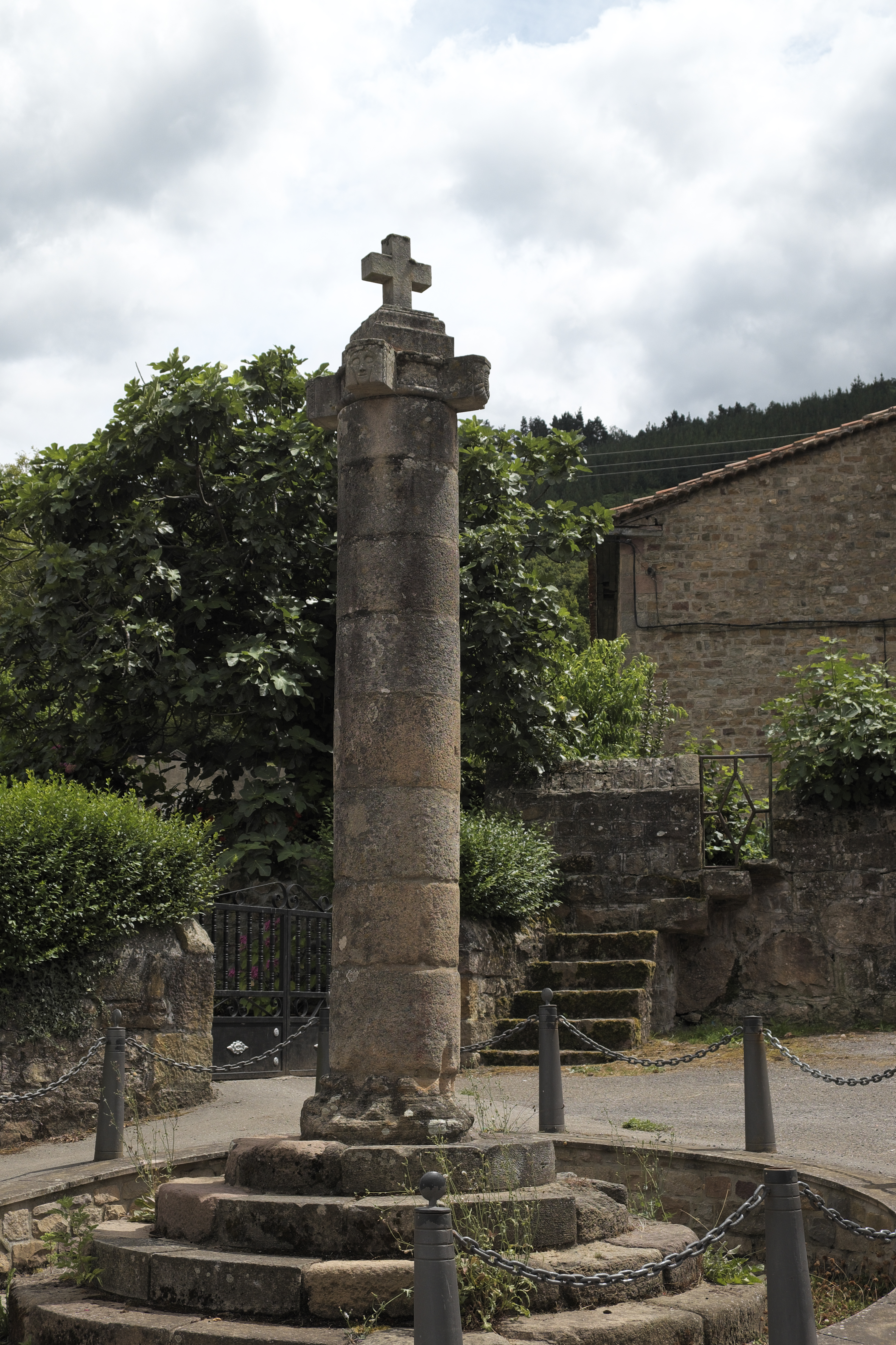 Pranger (Rollo de Justicia) in Bárcena de Pie de Concha (Kantabrien/Spanien)